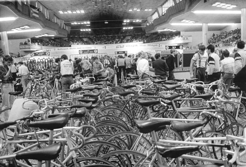 Berlin, Bahnradrennen, Innenfeld, Fahrerlager ADN-ZB Oberst 10.1.89 Berlin: Winterbahn - Die Rennmaschinen beherrschen das Fahrerlager. Zum Abschluß der diesjährigen Saison auf der Berliner Winterbahn in der Werner-Seelenbinder-Halle wird am kommenden Wochenende vor Beginn der DDR-Hallenmeisterschaften 1989 der Männer und Frauen ein ähnlicher Ansturm der Räder zu erwarten sein (Foto vom Soli-Renntag am 7.1.89)